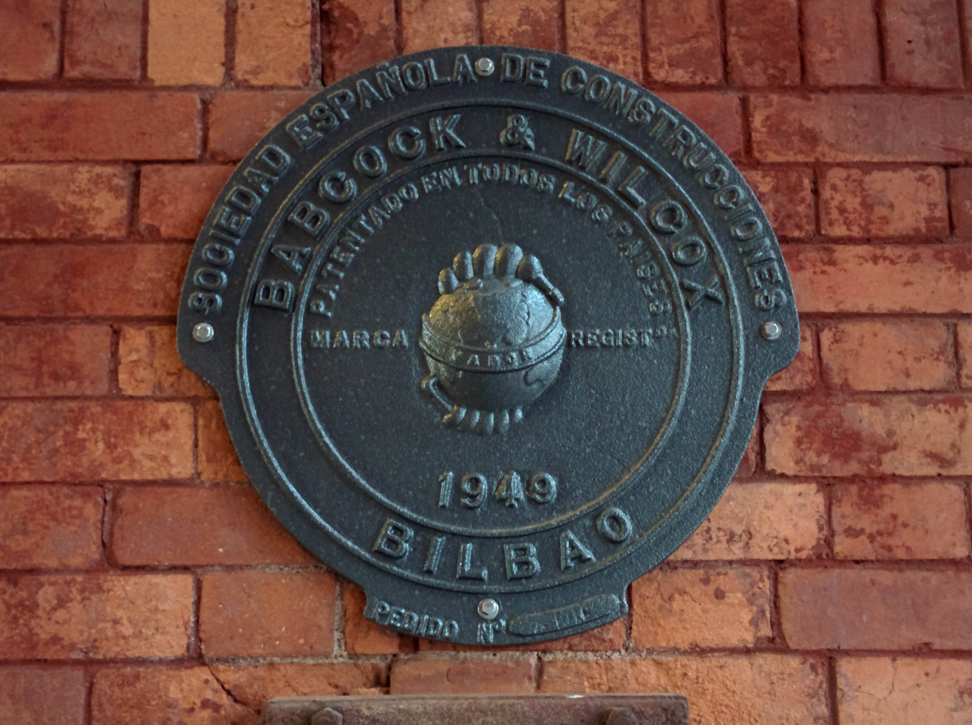 Museo de la Energía (Ponferrada, León). Caldera Babcook y Wilcox.